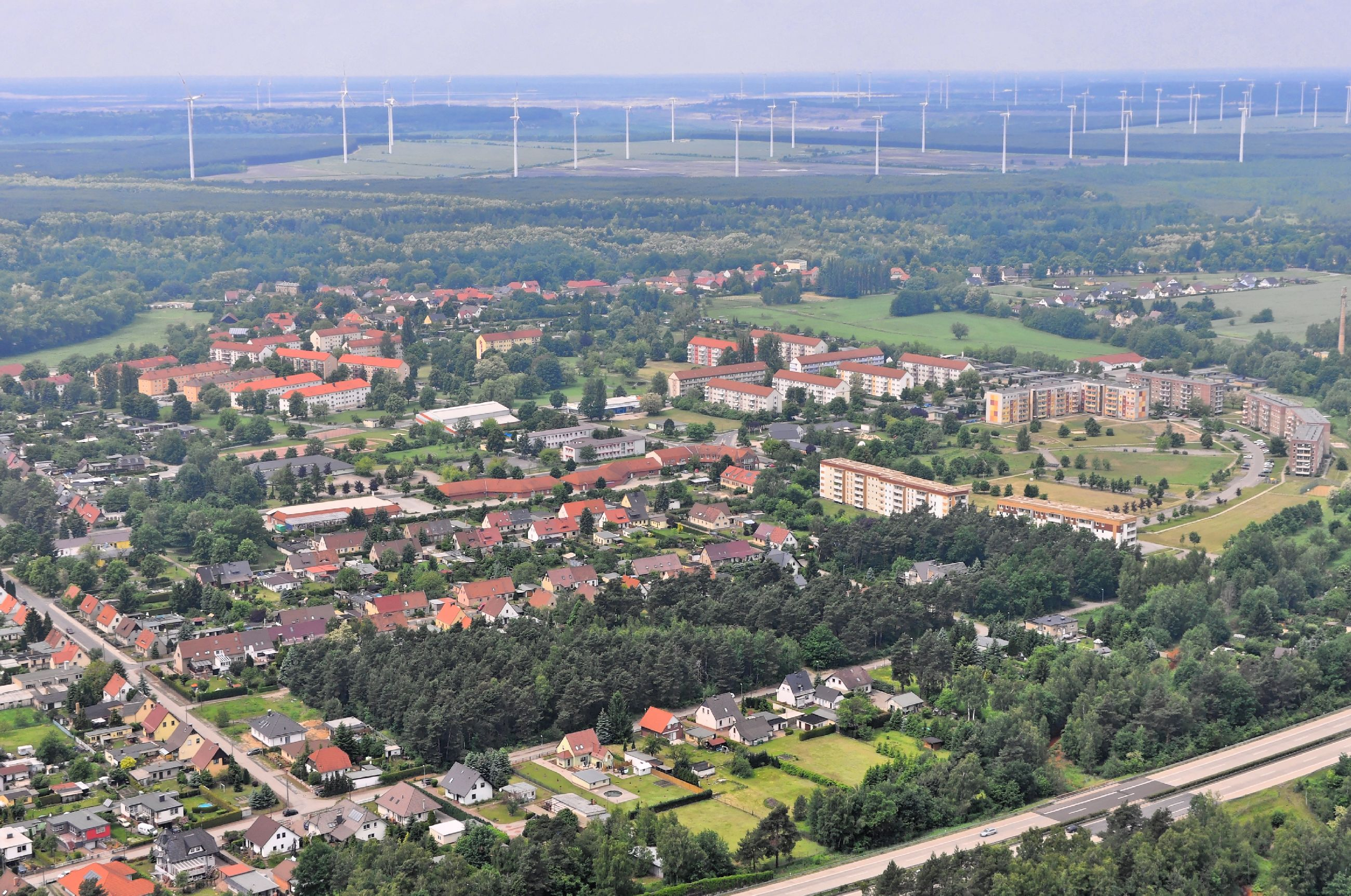 Luftaufnahme von Schipkau, im Hintergrund der Windpark Klettwitz-Nord; Überführungsflug vom Flugplatz Schwarzheide-Schipkau über Potsdam, Lüneburg zum Flugplatz Nordholz-Spieka; zu sehen ist Schikpkau, im Hintergrund der Windpark Klettwitz